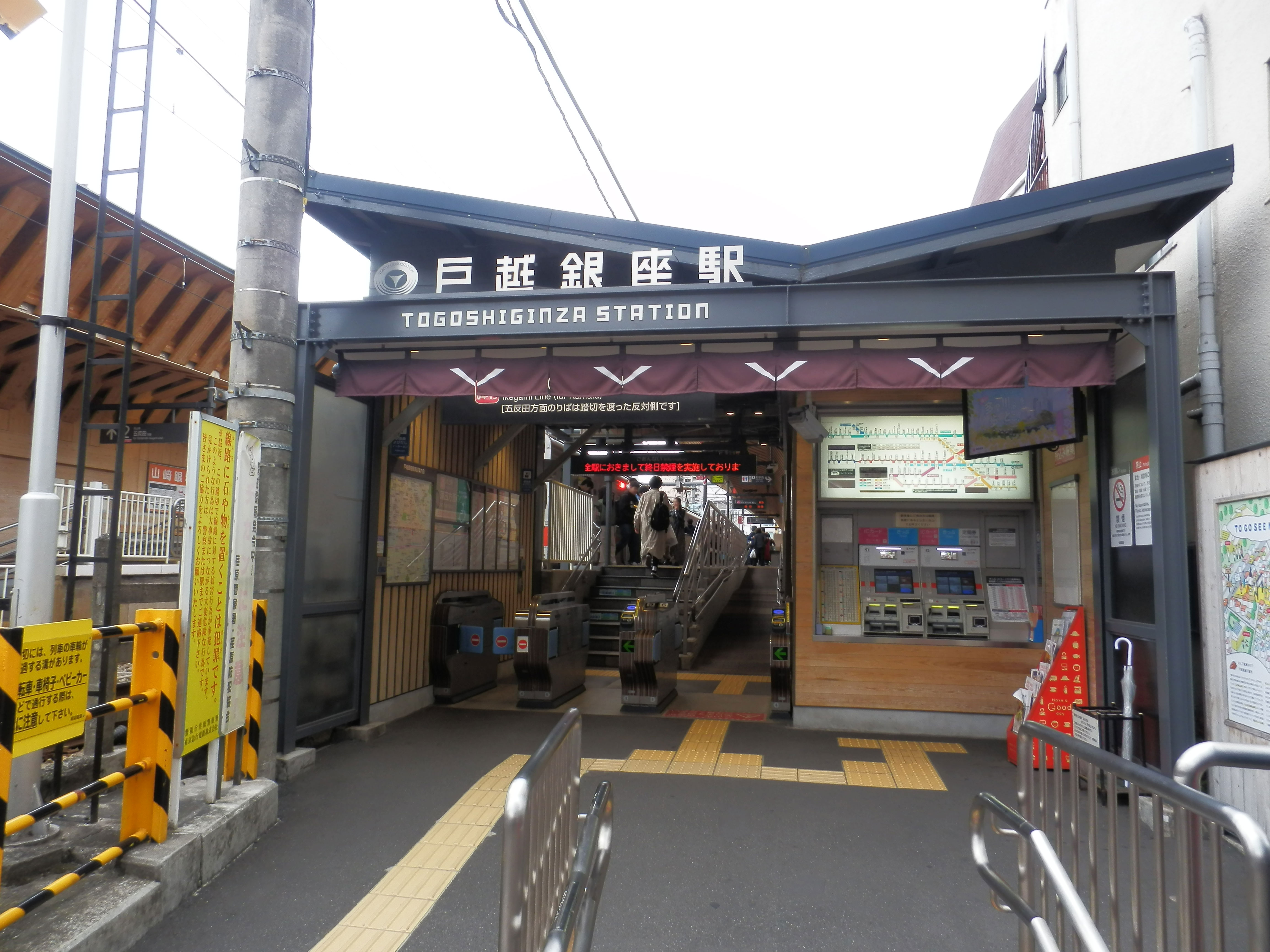 戸越銀座駅蒲田方面入口